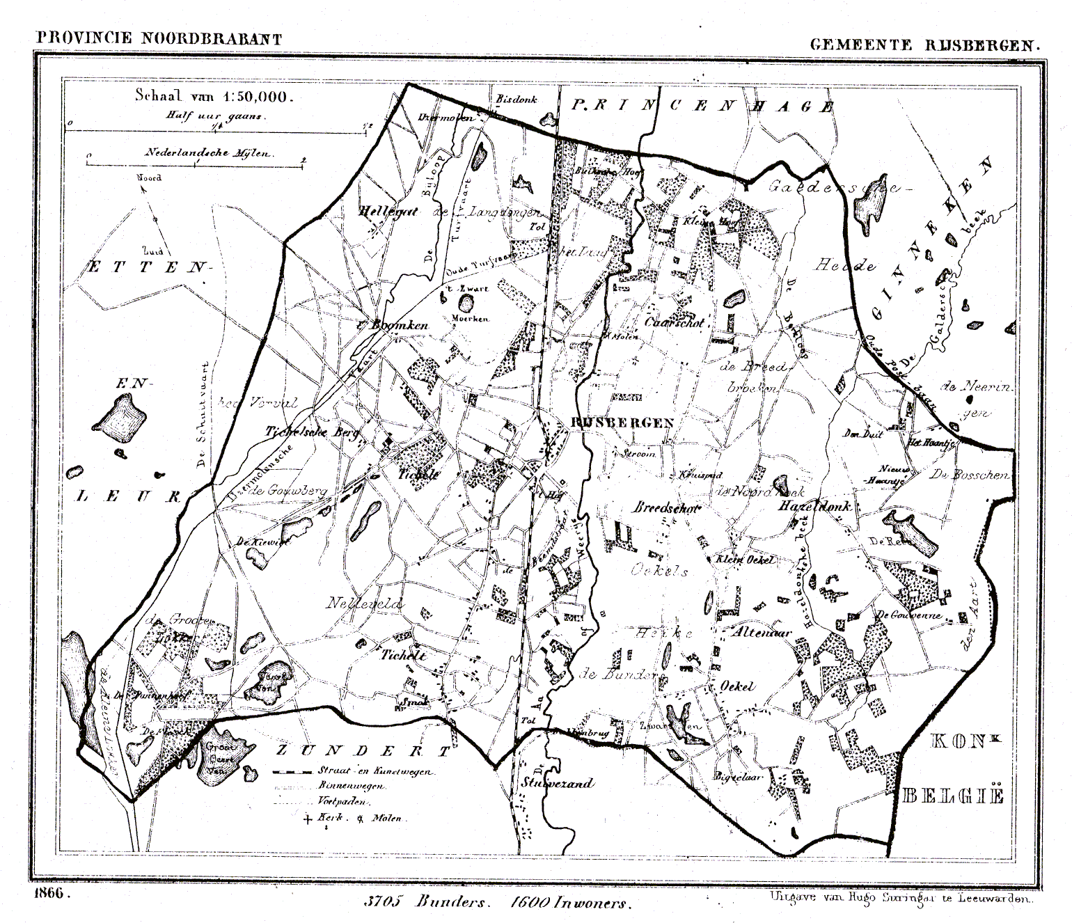 Nederland, Noord-Brabant, Gemeente Rijsbergen